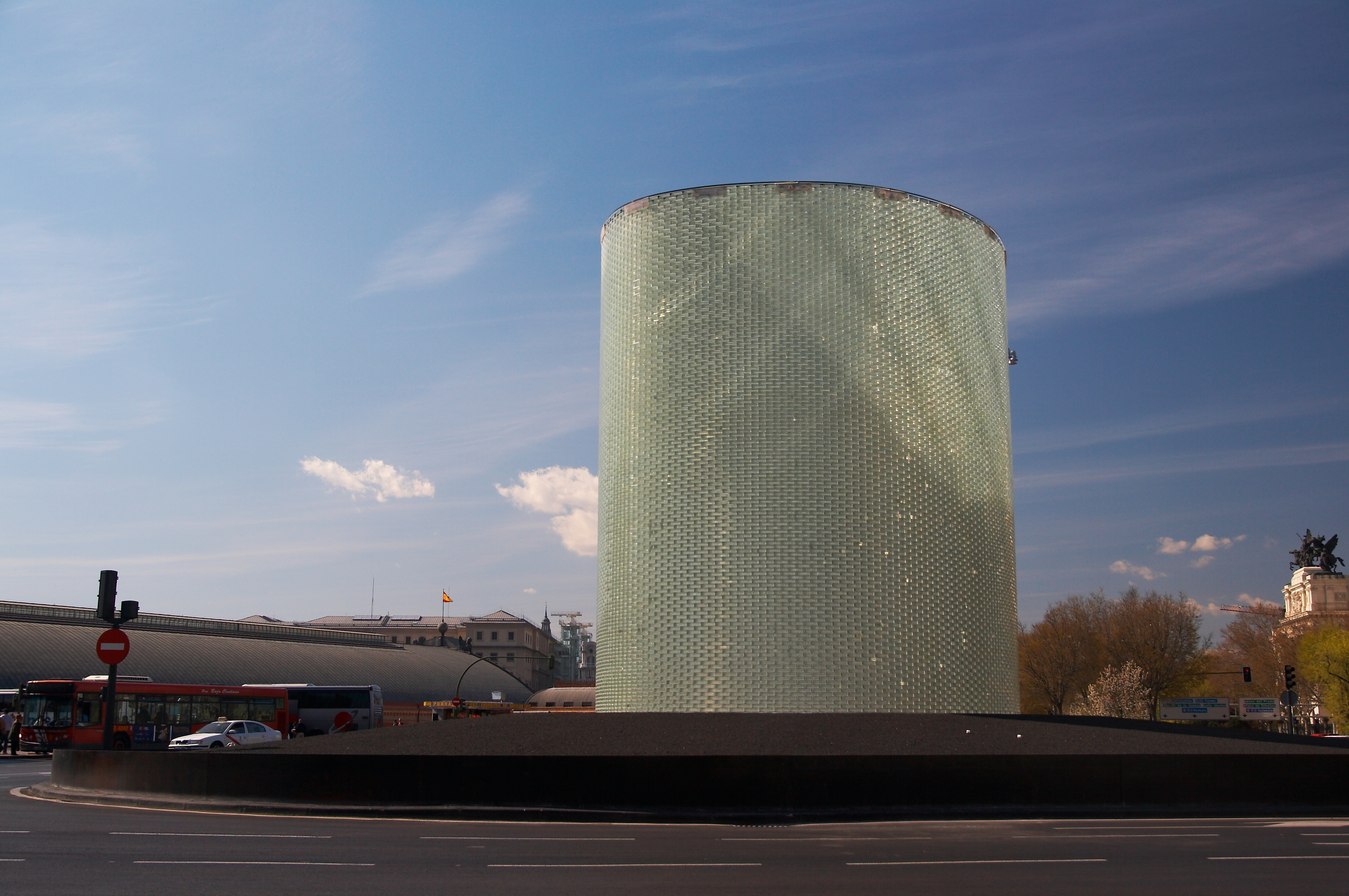 Monumento 11-M, estación de Atocha, Madrid.